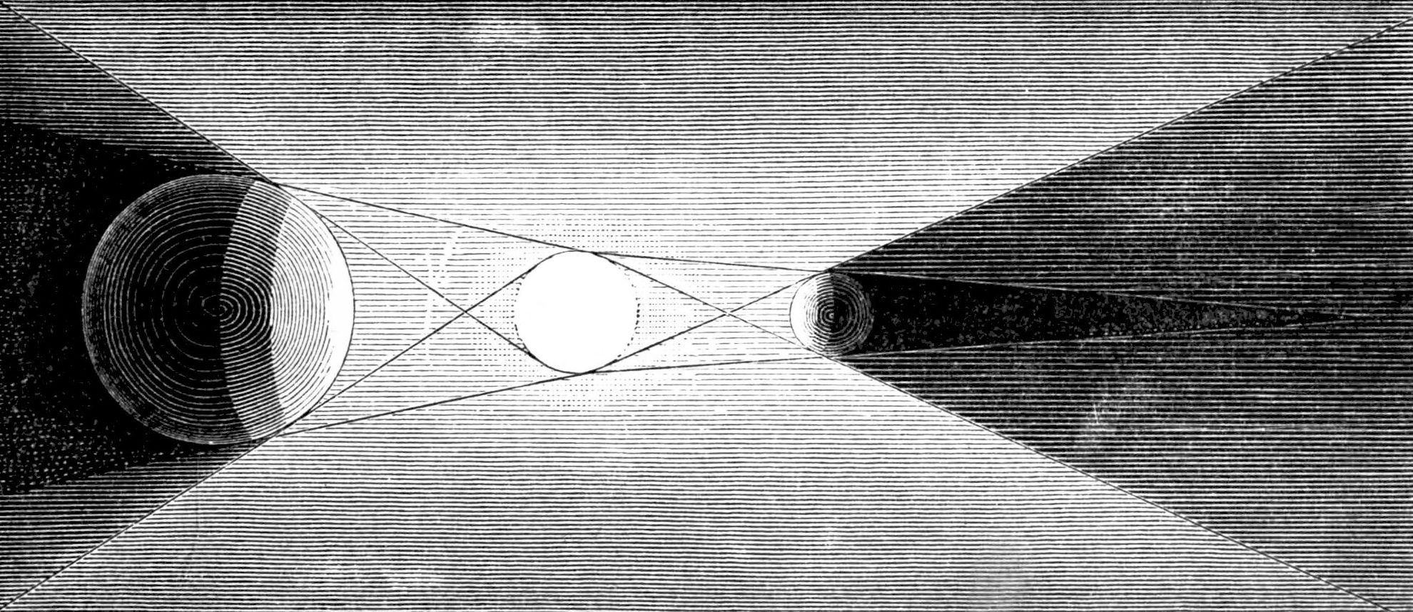 Umbra and penumbra